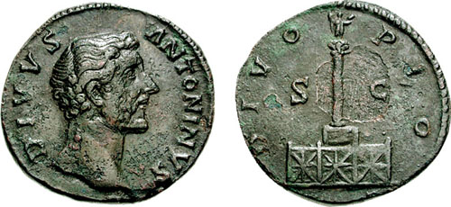 monnaie d'Antonin le Pieux divinize revers DIVO PIO